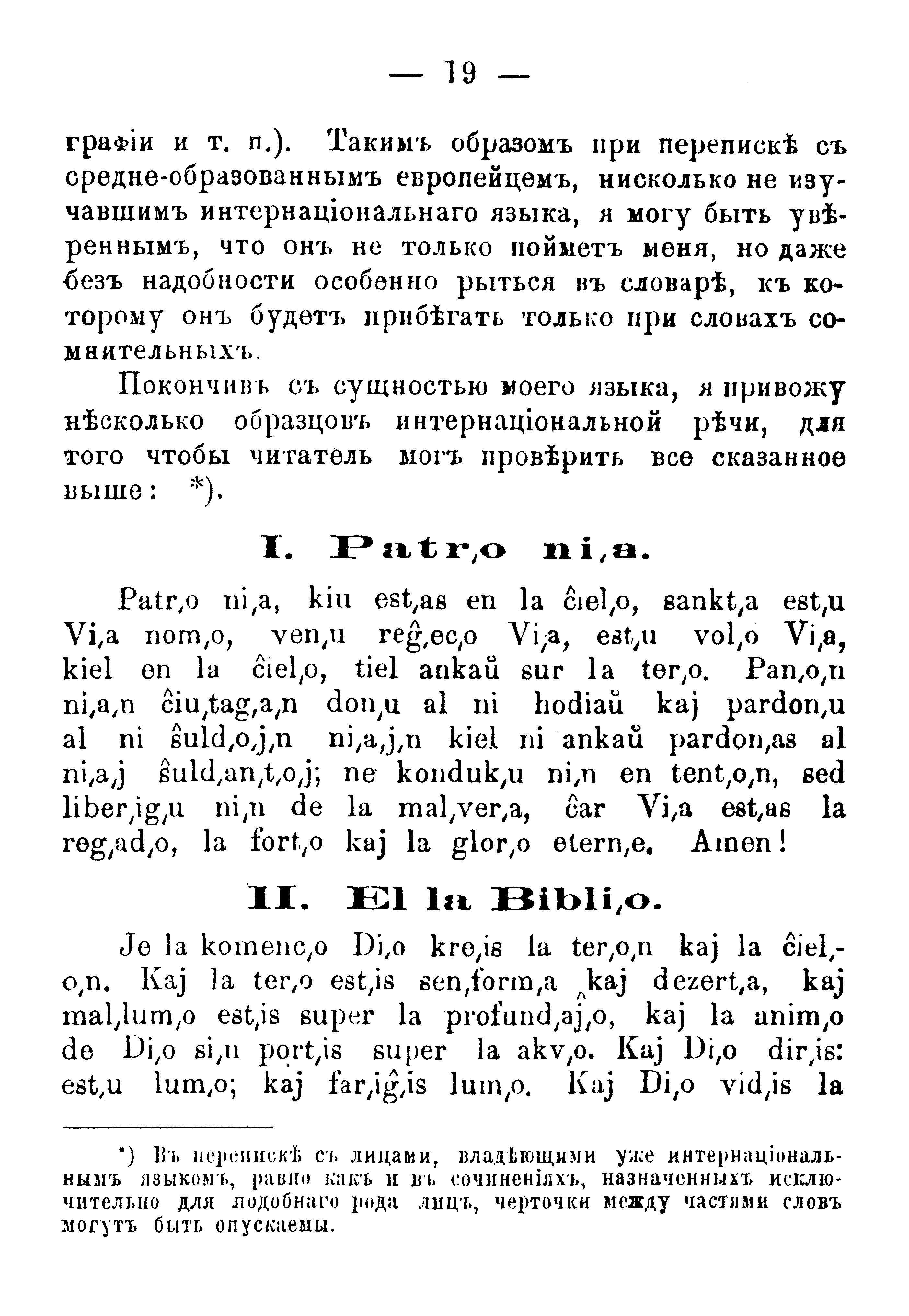 Meĵdunarodnij jazik. Predislovie i polnij uĉebnik. (por Rus·o·j) (Internacia lingvo. Antaŭparolo kaj plena lernolibro.) La Unua Libro de Esperanto, 1‑a eldono, Varsovio, 1887. Represaĵo de la eldonejo „Impeto“, Moskvo, 2004. Paĝo 19. Skanita kun unubitaj rastrumeroj je 600 dpi